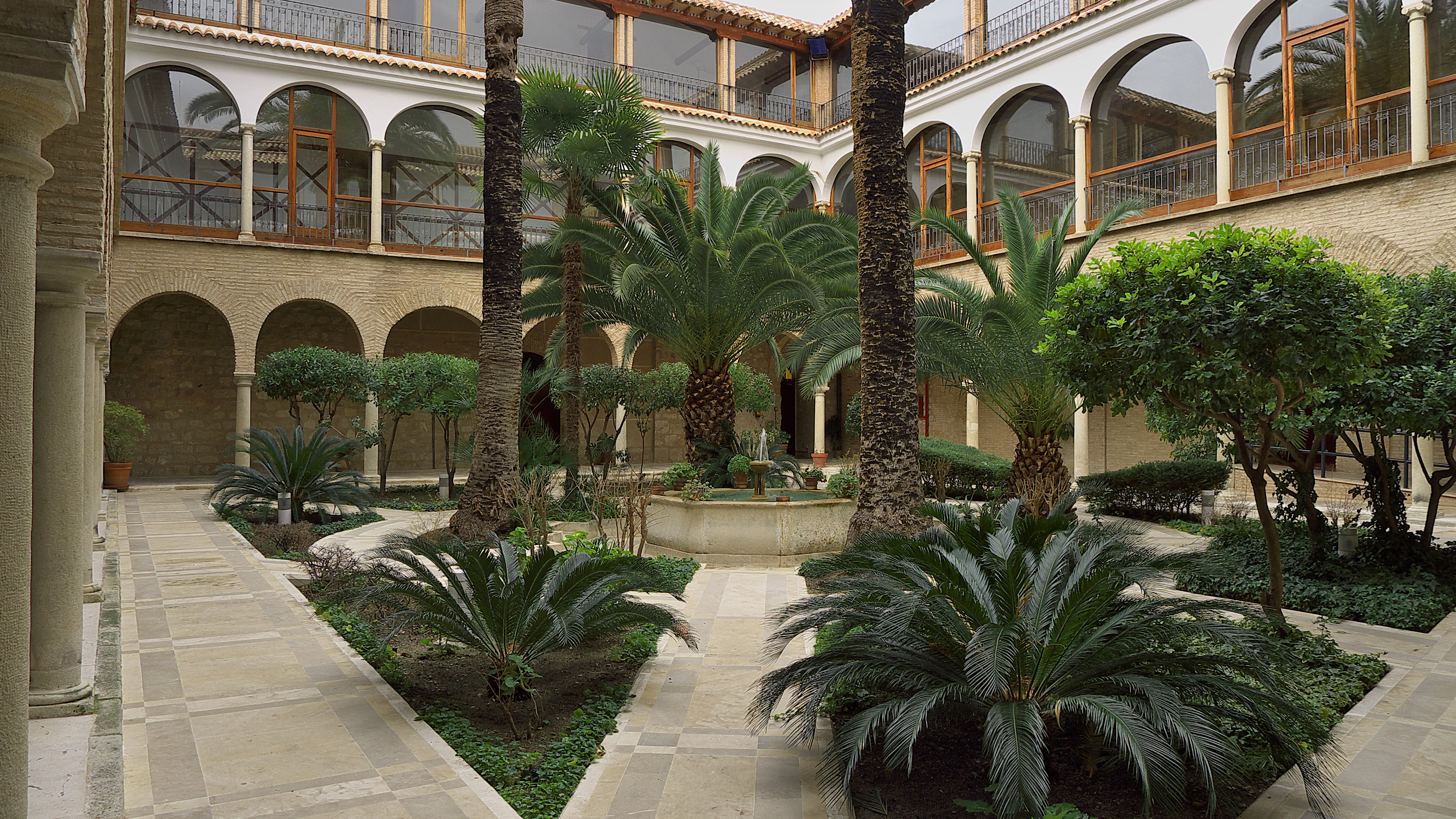 Antiguos hospitales de la Santa Misericordia y de San Lázaro (s. XVI)